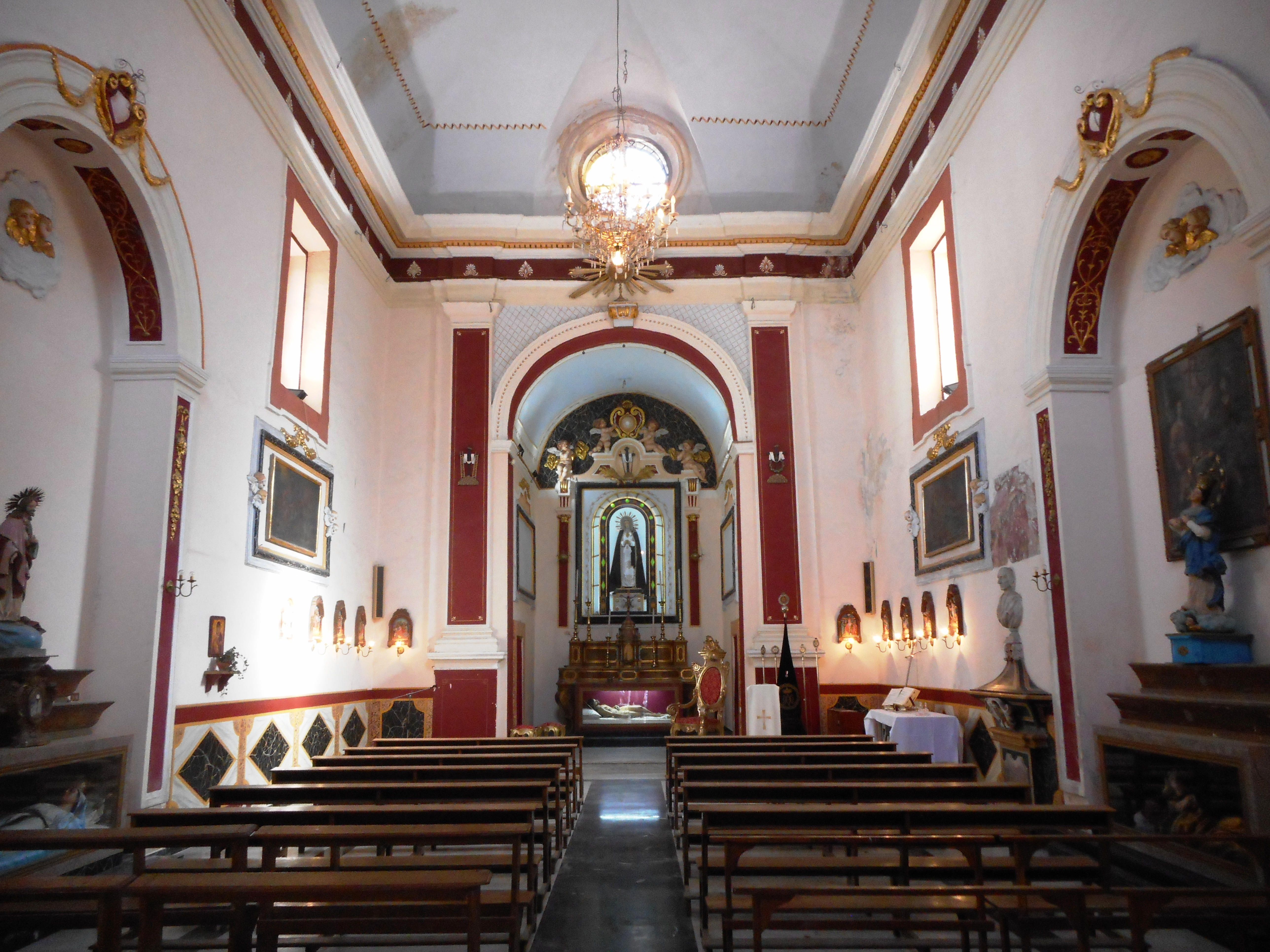 Interno della chiesa di San Giovanni alla Guilla